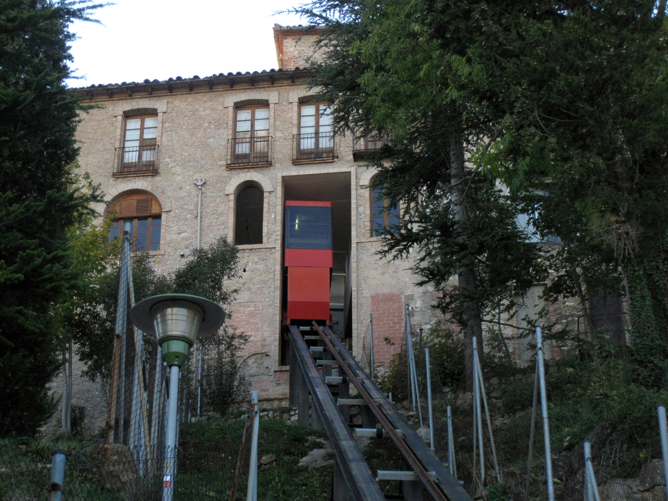 Santuari de la Mare de Déu de Queralt (Berga) Object location42° 06′ 27.78″ N, 1° 49′ 38.26″ E